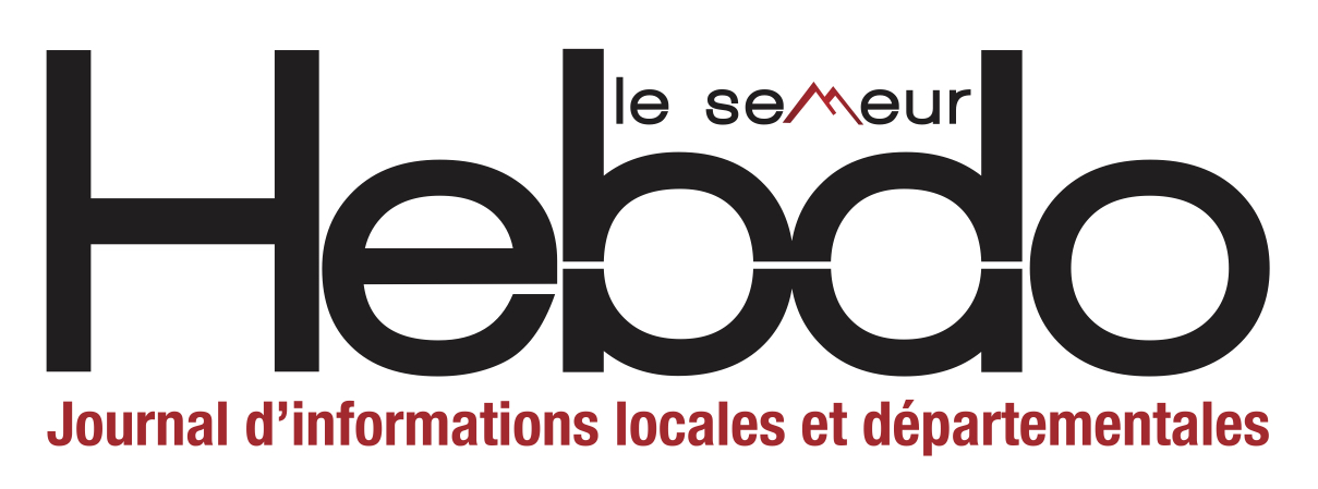 Logo Semeur Hebdo 2019